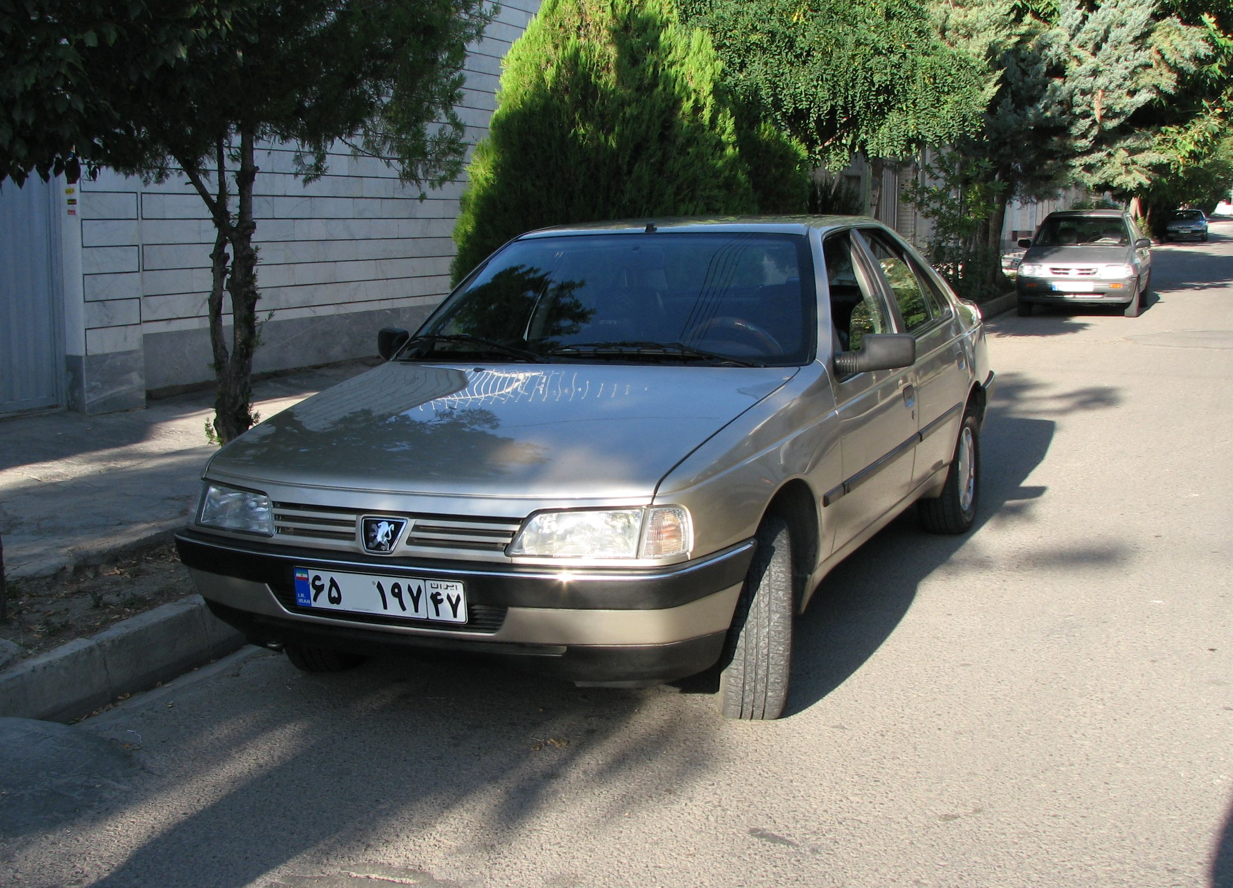 پژو 405 جی‌ال‌ایکس نمره شده در اراک.